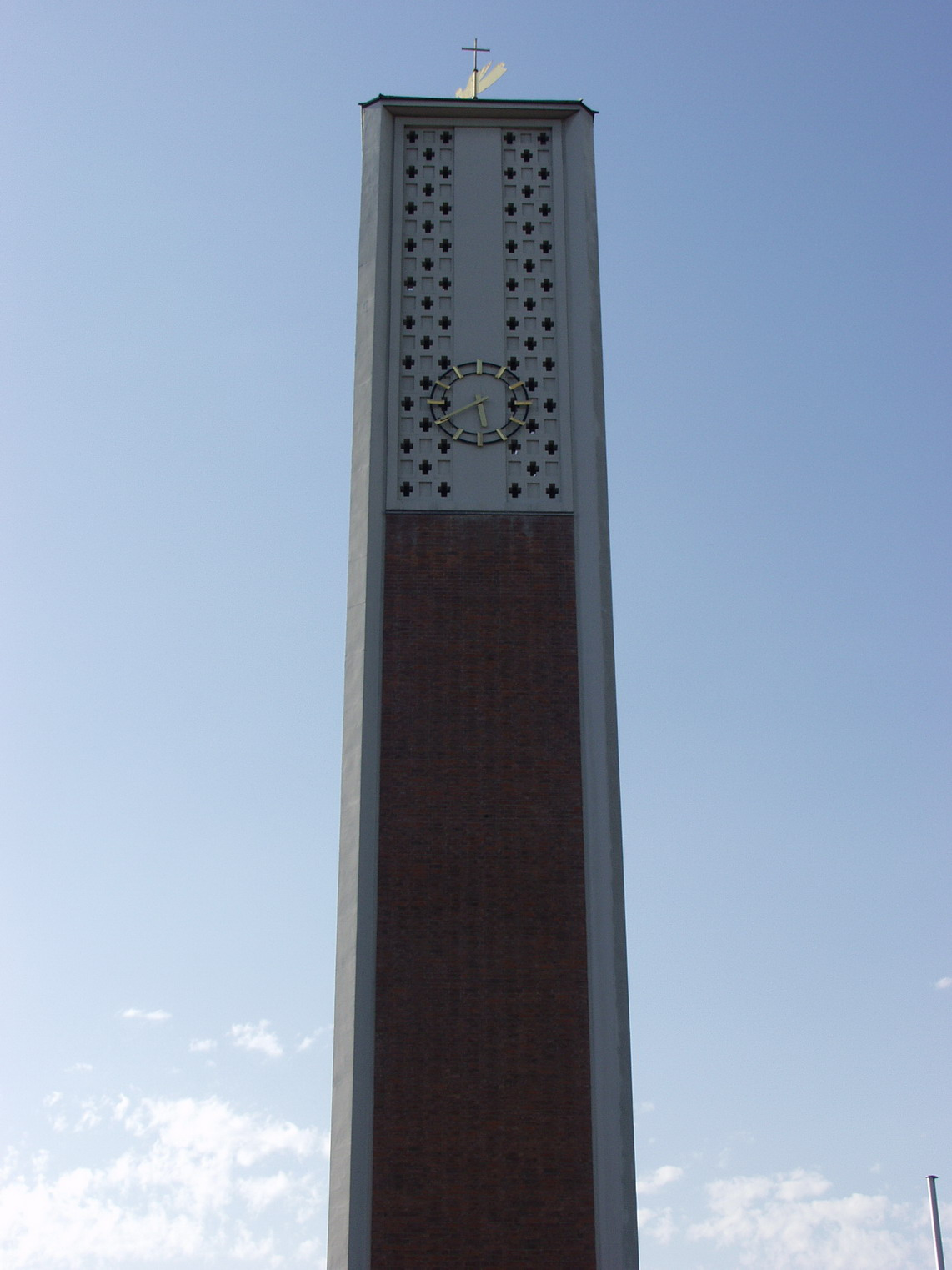 Kirchturm der Pfarrei Herz Jesu Schifferstadt